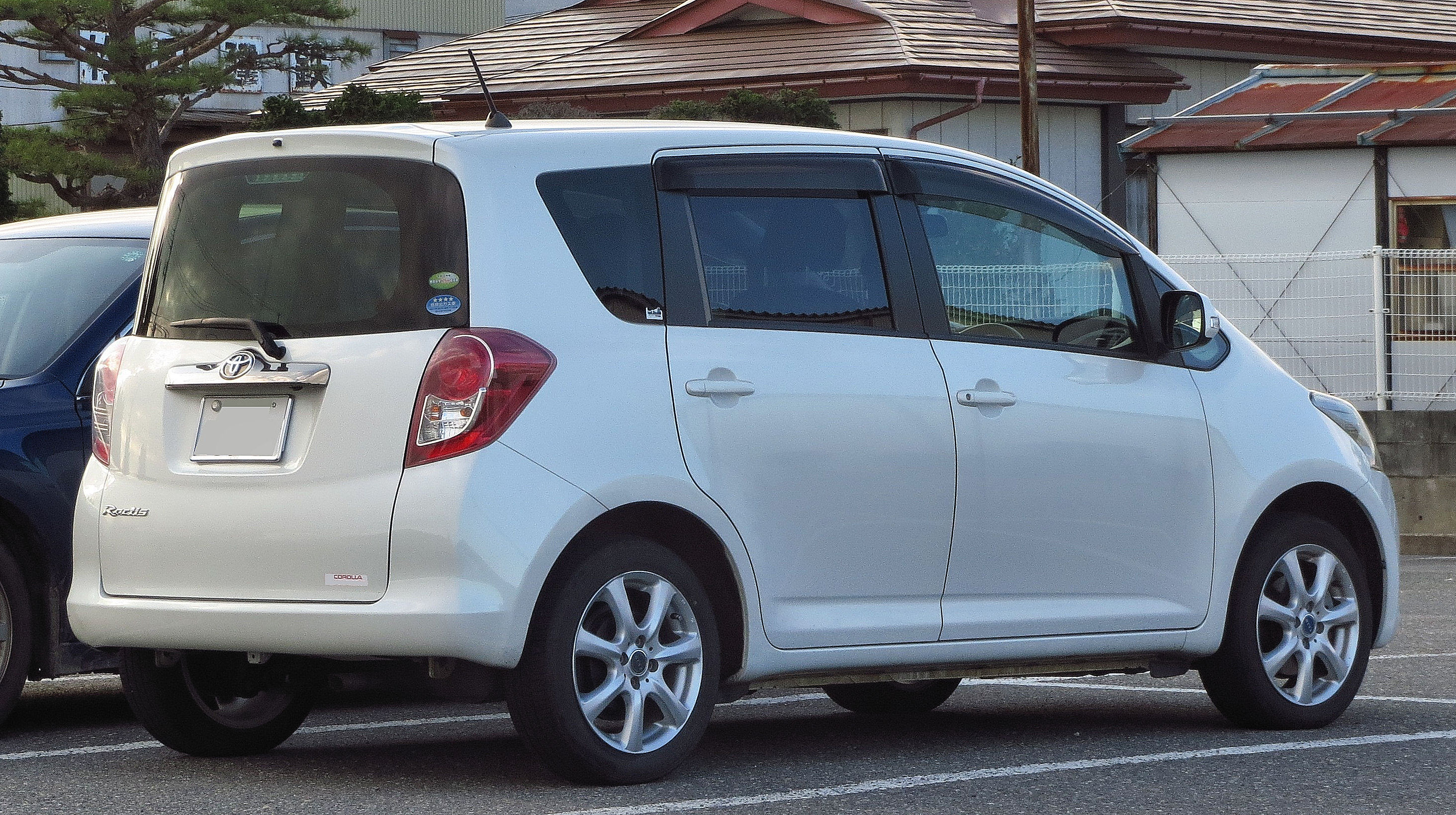 トヨタ ラクティス X Lパッケージ 1300